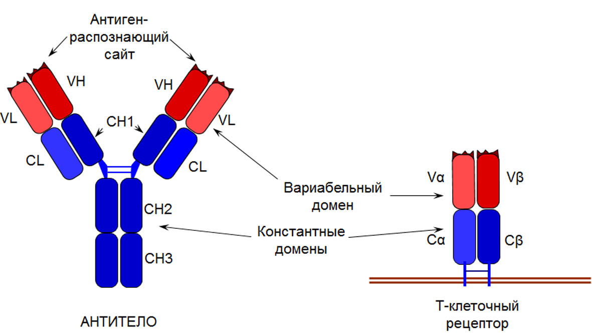 Схематическое изображение доменной структуры иммуноглобулина (антитела) и Т-клеточного рецептора. Цветами выделены константные и вариабельные домены, а также антиген-распознающий сайт.